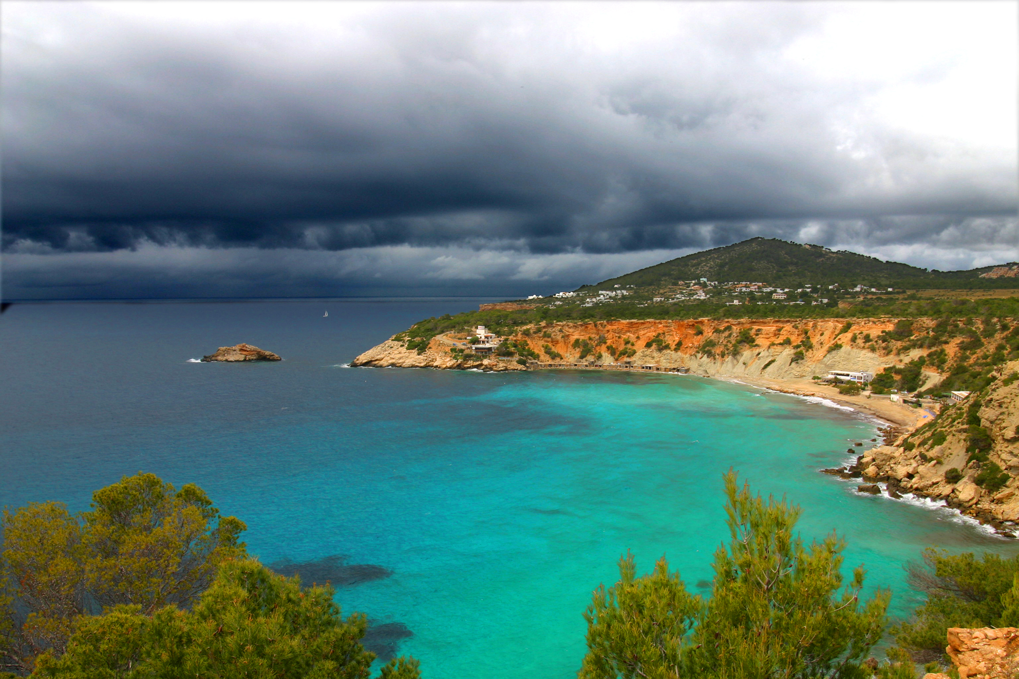 Bildbeschreibung: Ibiza Quelle: "selbst fotografiert" Fotograf/Zeichner: ADC